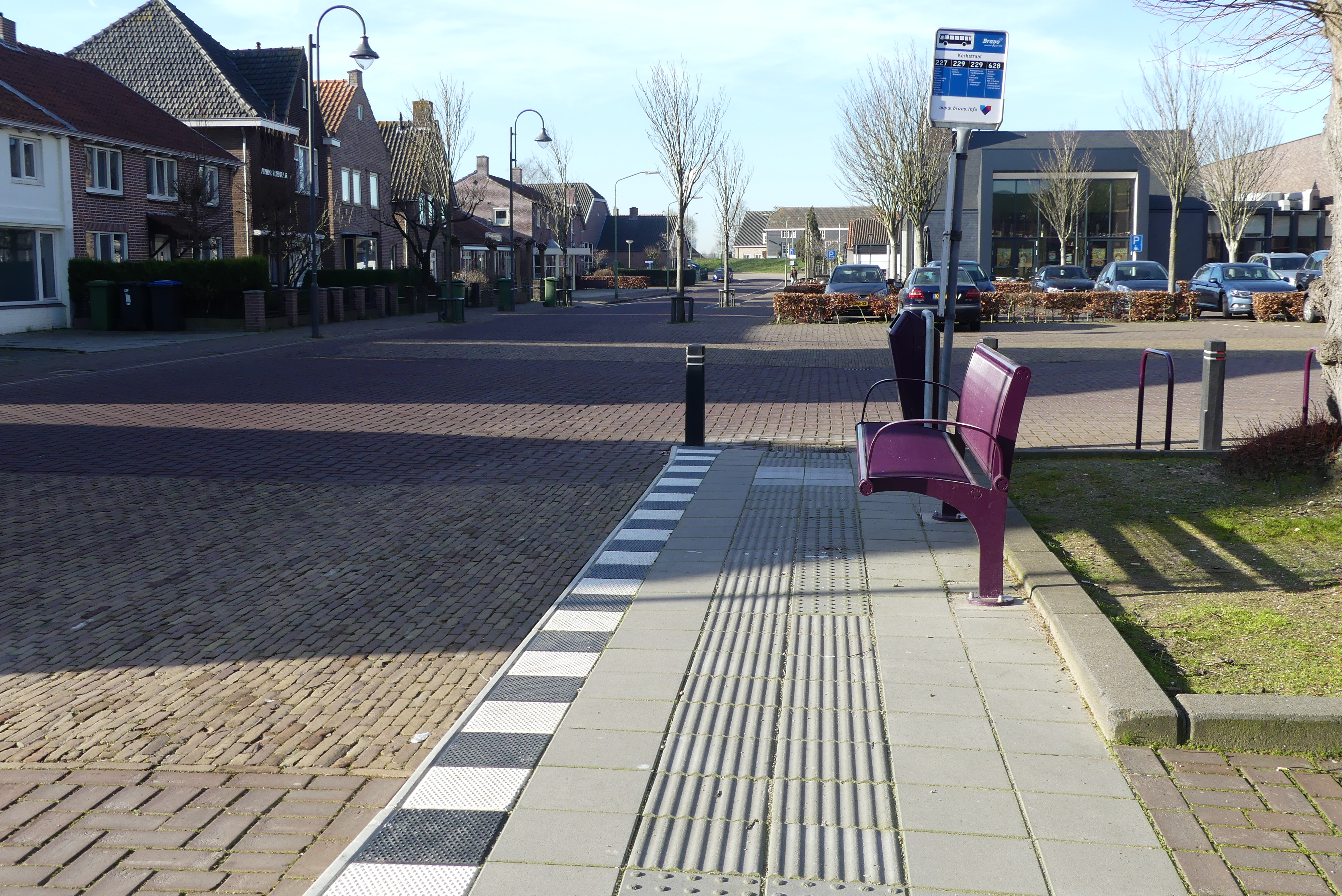 Zicht op de bushalte in een deel van de Kerkstraat in Hank